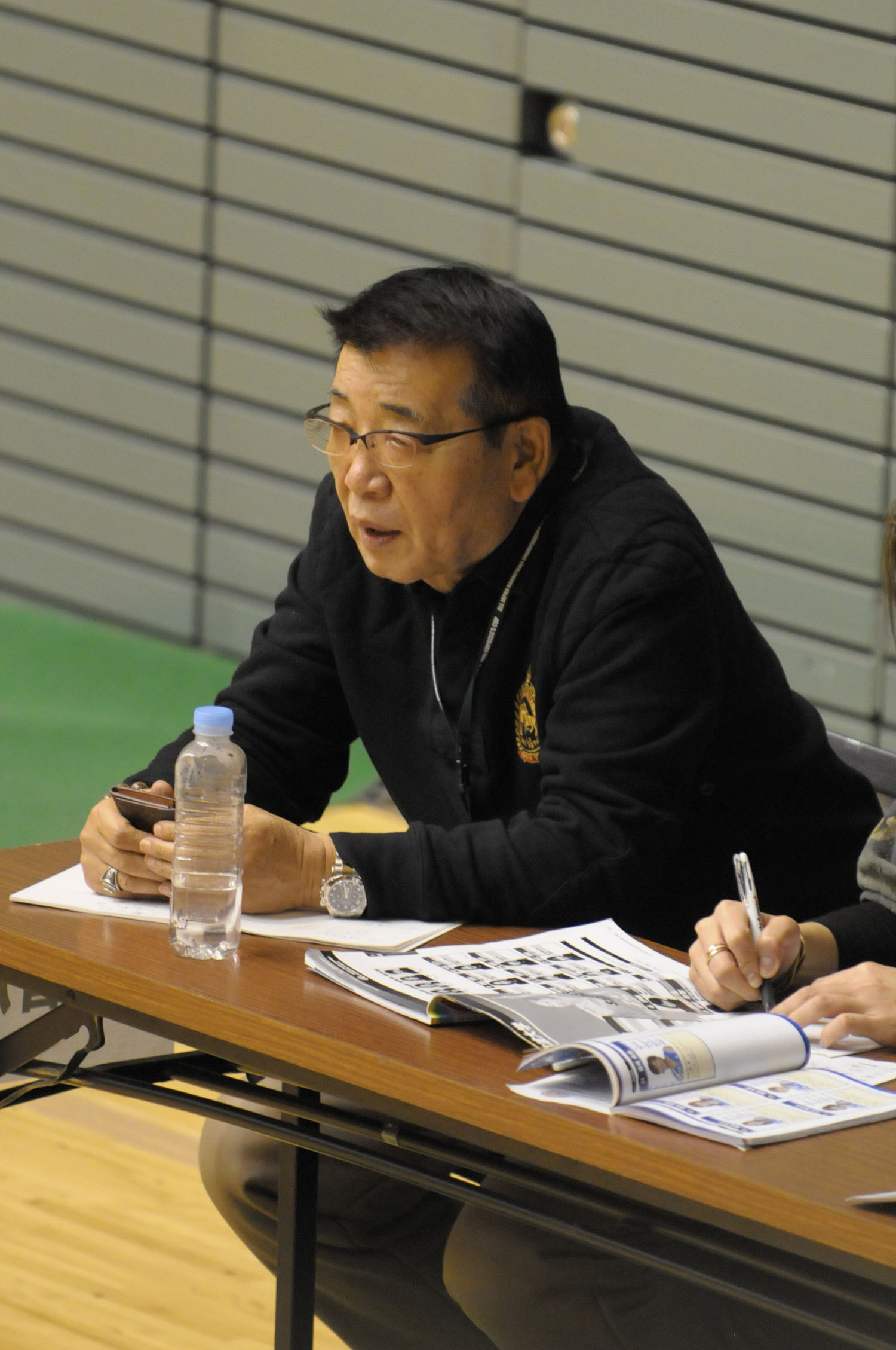 桜花学園高等学校、井上眞一監督。駒沢体育館で。